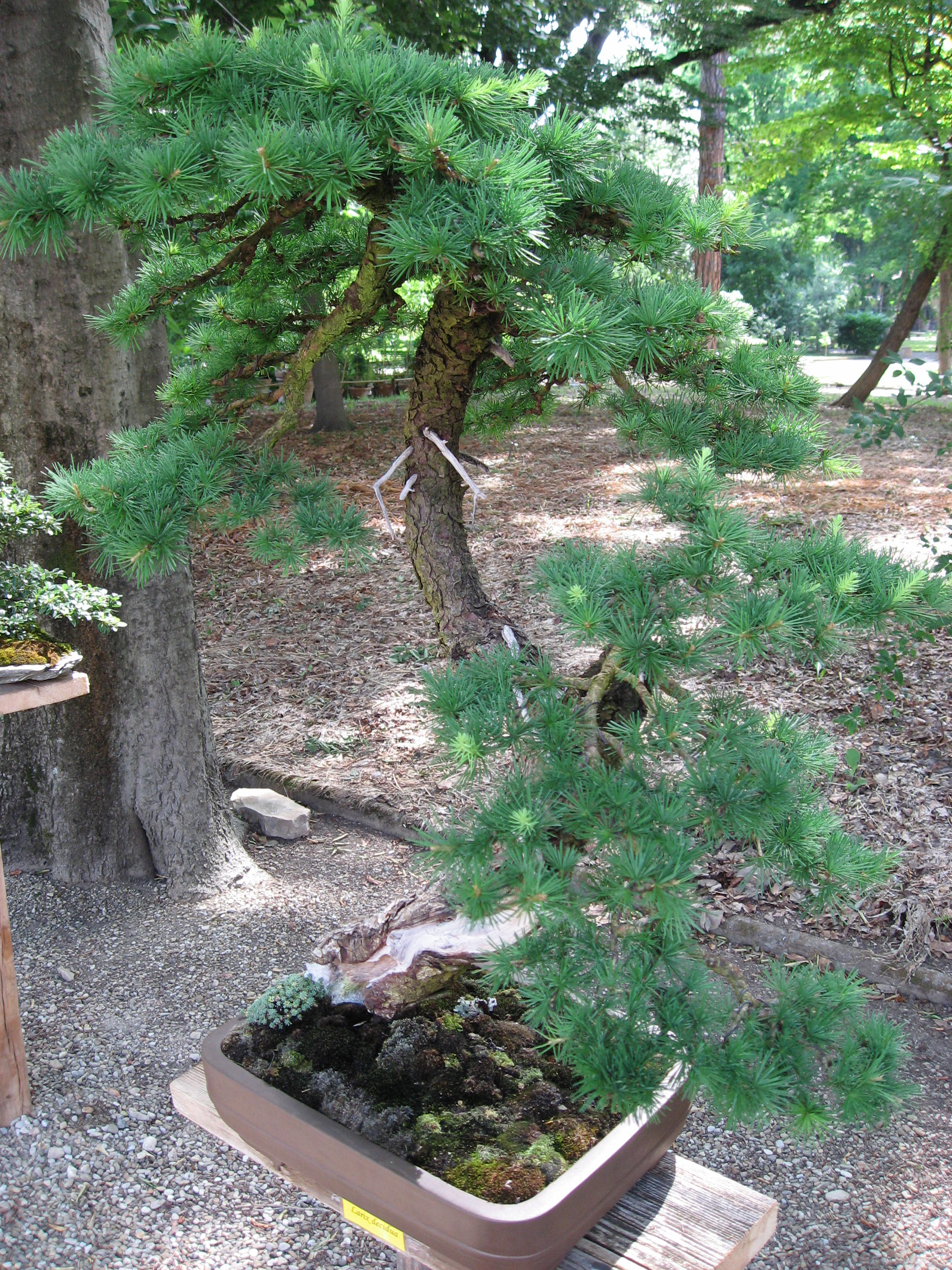 Larix decidua bonzai in Giardino dei Semplici di Firenze Map: 43° 46' 45" N 11° 15' 39" E